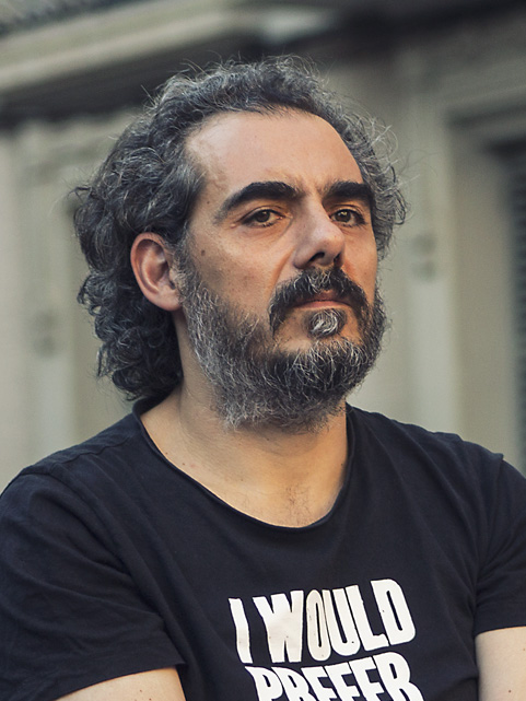 Plaça Navas 04/06/2015 Foto: Marc Lozano